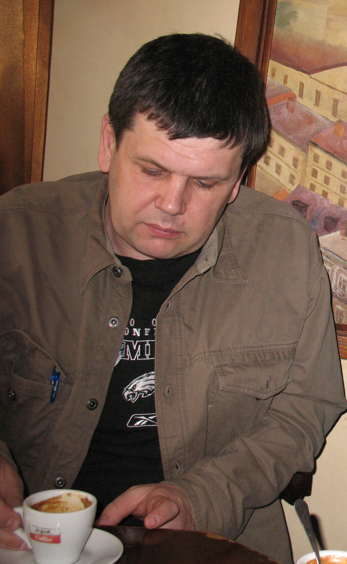 Український поет Іван Ципердюк, 2009 рік